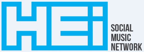 Logo de HEi.